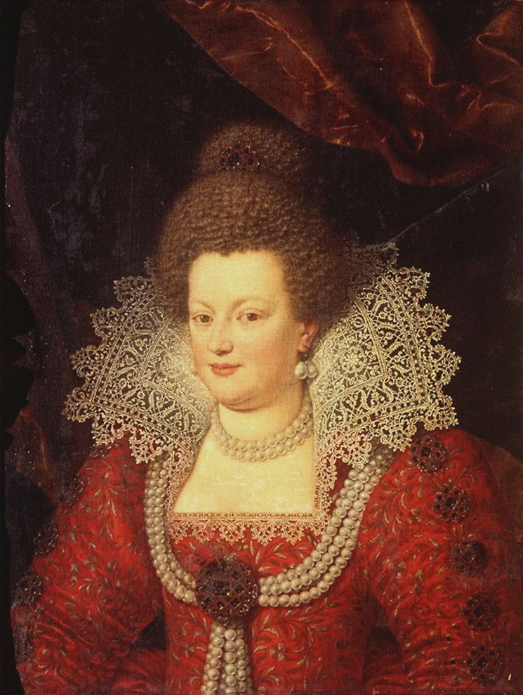 Maria de' Medici (1575-1642) regina di Franciatitle QS:P1476,it:"Maria de' Medici (1575-1642) regina di Francia" label QS:Lit,"Maria de' Medici (1575-1642) regina di Francia"